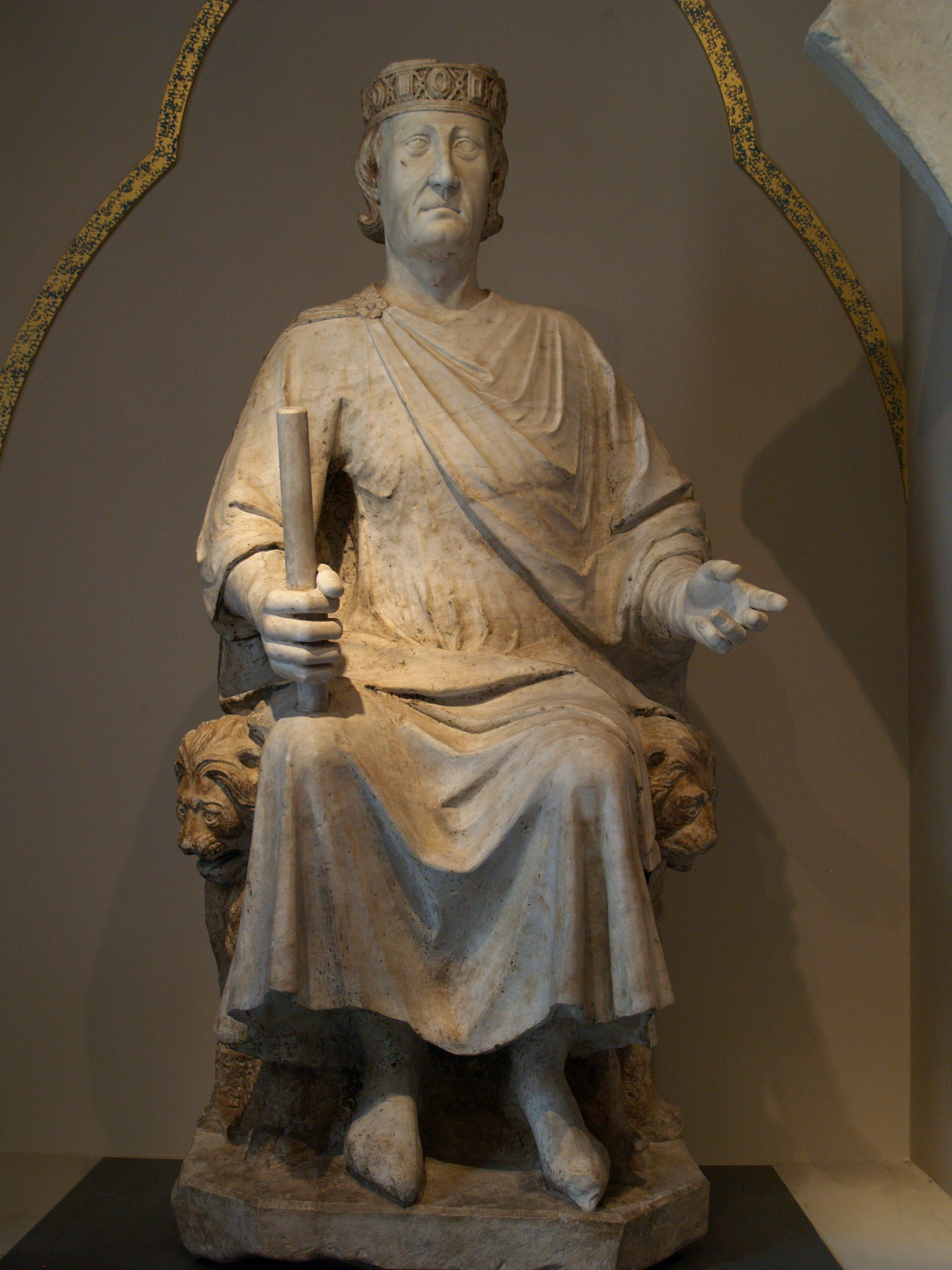 Roma, Museos Capitolinos, estatua de Carlos I de Anjou, del monumento de Arnolfo di Cambio.